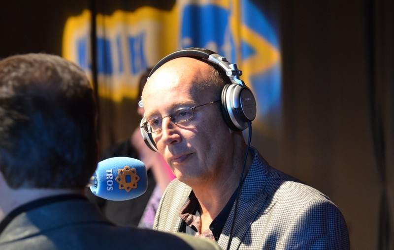 Daniël Dekker.